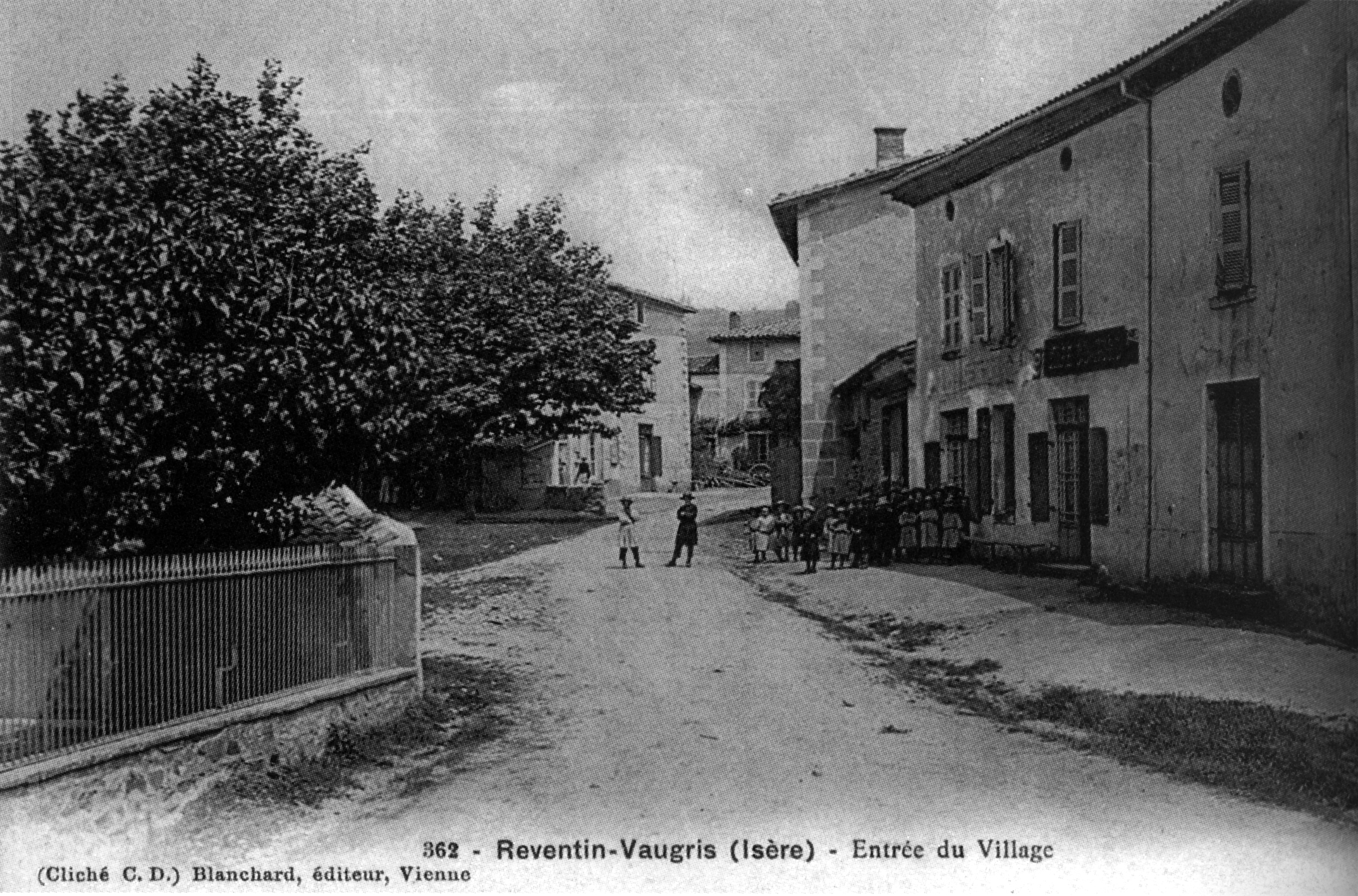 Reventin-Vaugris, entrée du village, 1906